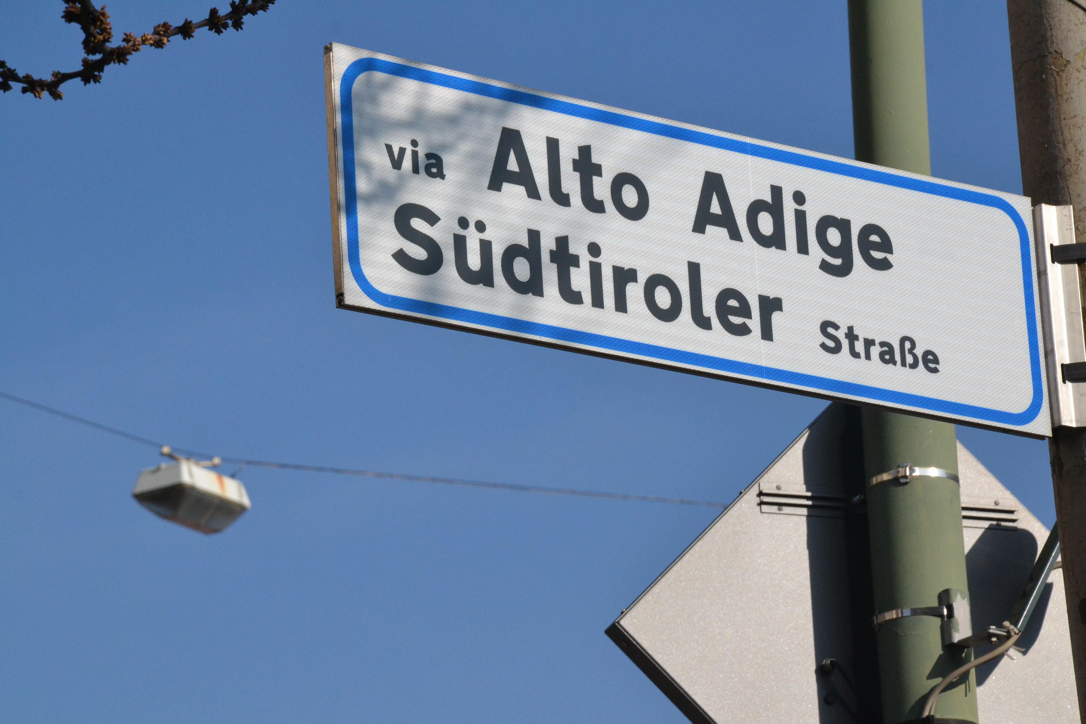 Panneau de rue bilingue à Bolzano/Bozen (Italie). Version italienne : via Alto Adige ; version allemande : SüdTiroler Straße.